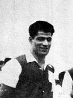 حسین سرودی در ترکیب تیم ملی ایران